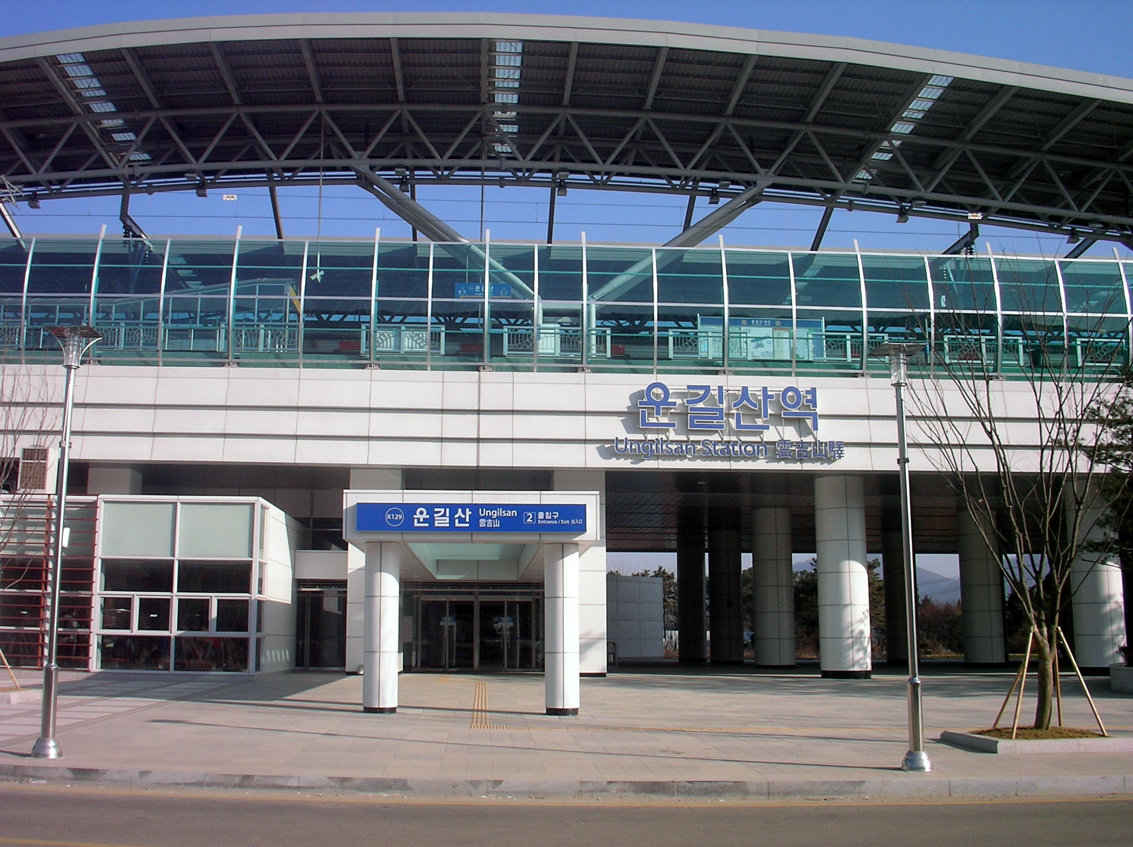 Ungilsan Station (ko ja)